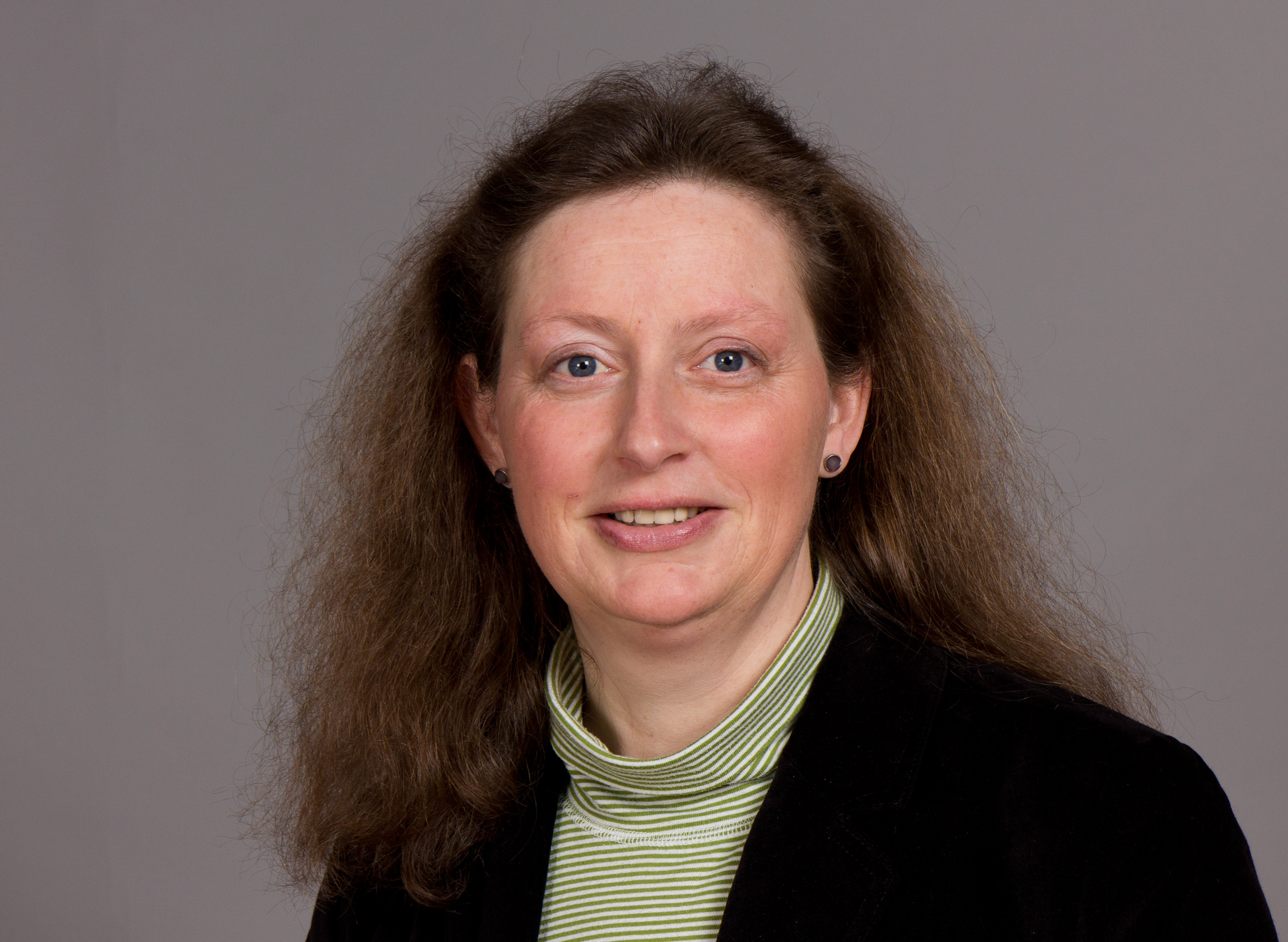 Elisabeth Bröskamp (* 30. September 1969 in Ibbenbüren) ist eine deutsche Politikerin (Bündnis 90/Die Grünen) und Mitglied des Landtages von Rheinland-Pfalz. Landtag Rheinland-Pfalz 2014 19. bis 20. Februar 2014 in MainzDieses Foto wurde im Rahmen des Projektes „WIKI loves parliaments/Landtag Rheinland-Pfalz“ erstellt. Fragen zur Nachnutzung Wenn Sie Fragen zur Nachnutzung dieses Bildes haben, können Sie sich jederzeit gern an wenden